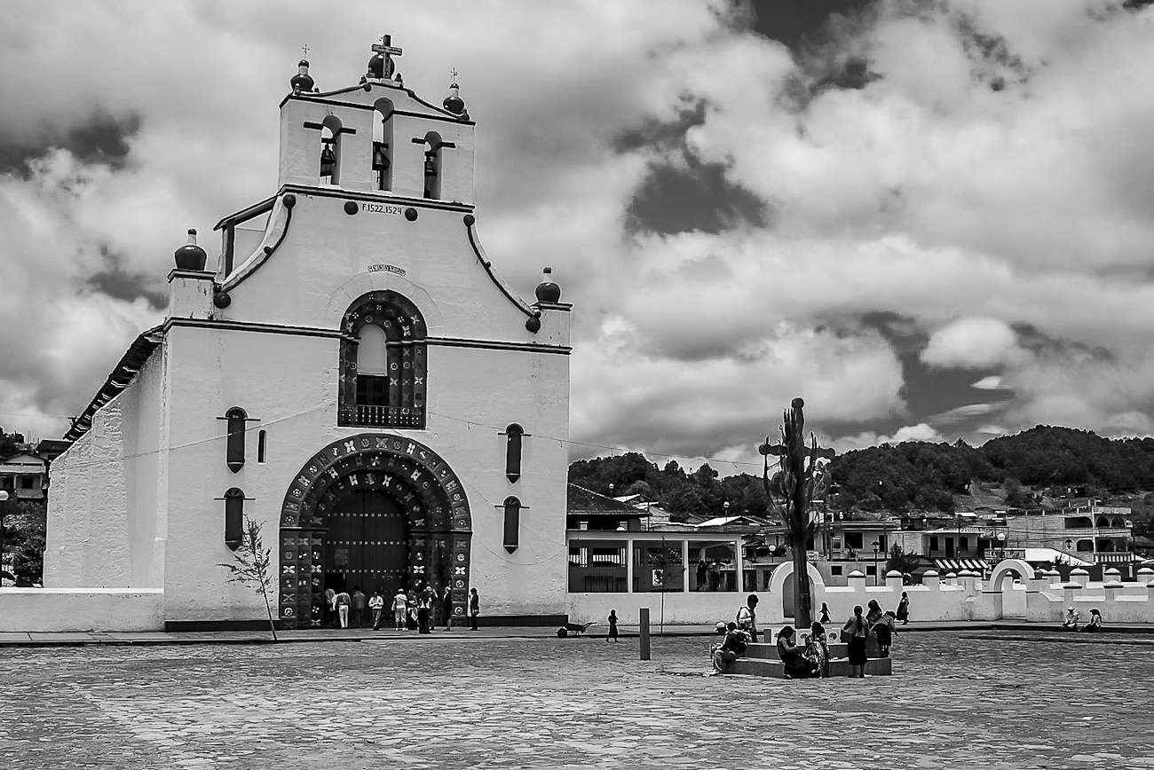 Templo de San Juan Chamula